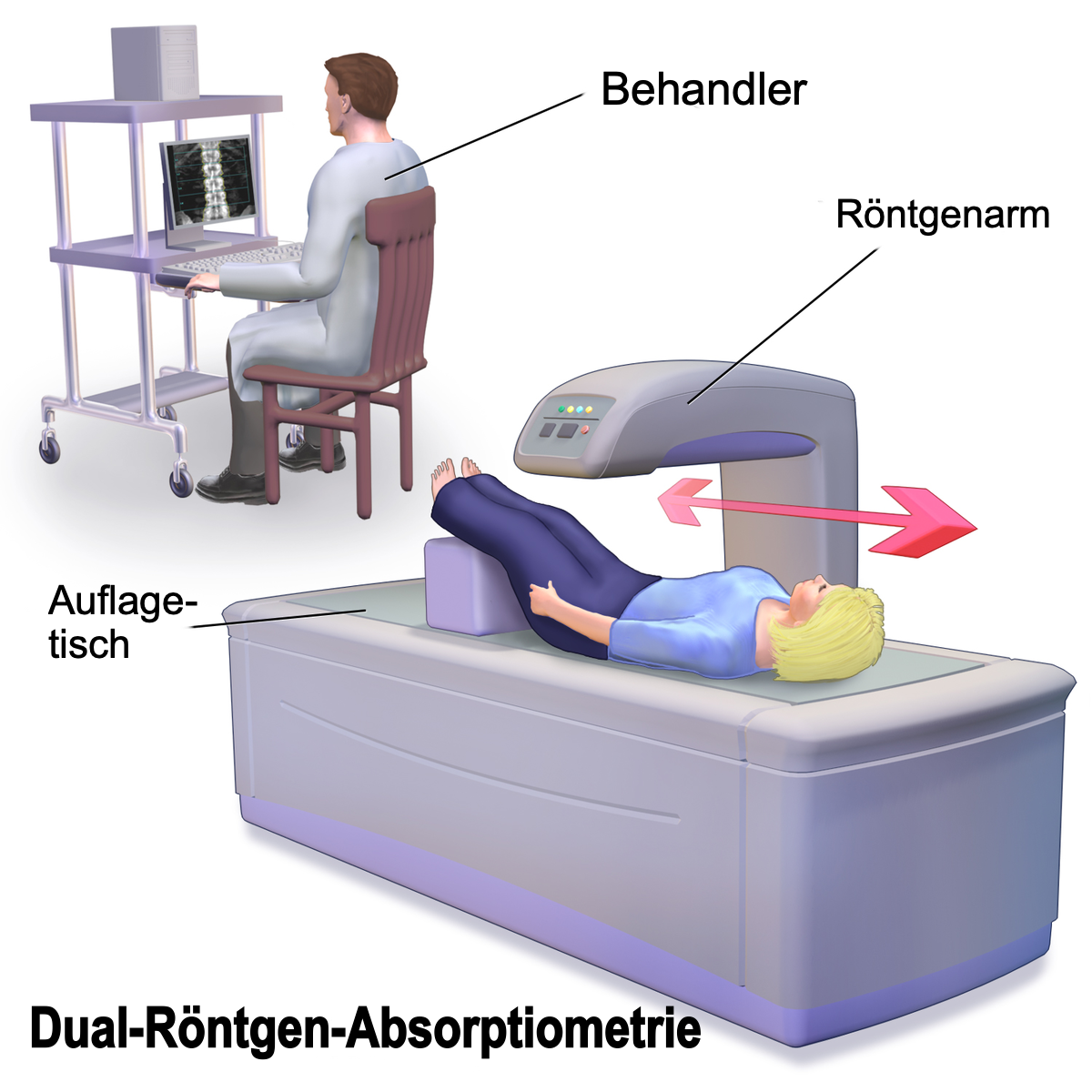 Röntgengerät zur Diagnostik der Osteoporose